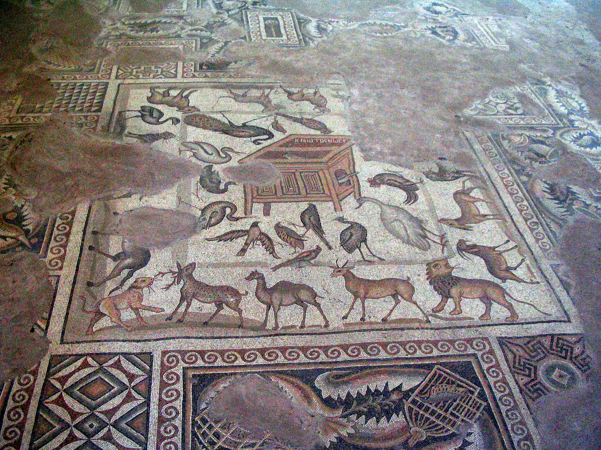 "Arche Noah"-Mosaik im Misis Mozaik Müzesi in Misis-Mopsuestia, Türkei